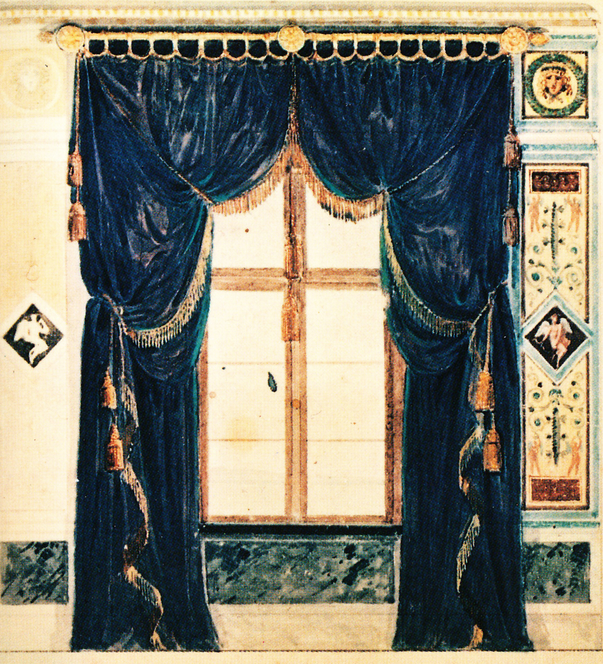 Carl Friedrich Schinkel Entwurf zum Südzimmer im Casino Klein Glienicke 1824 Fenster